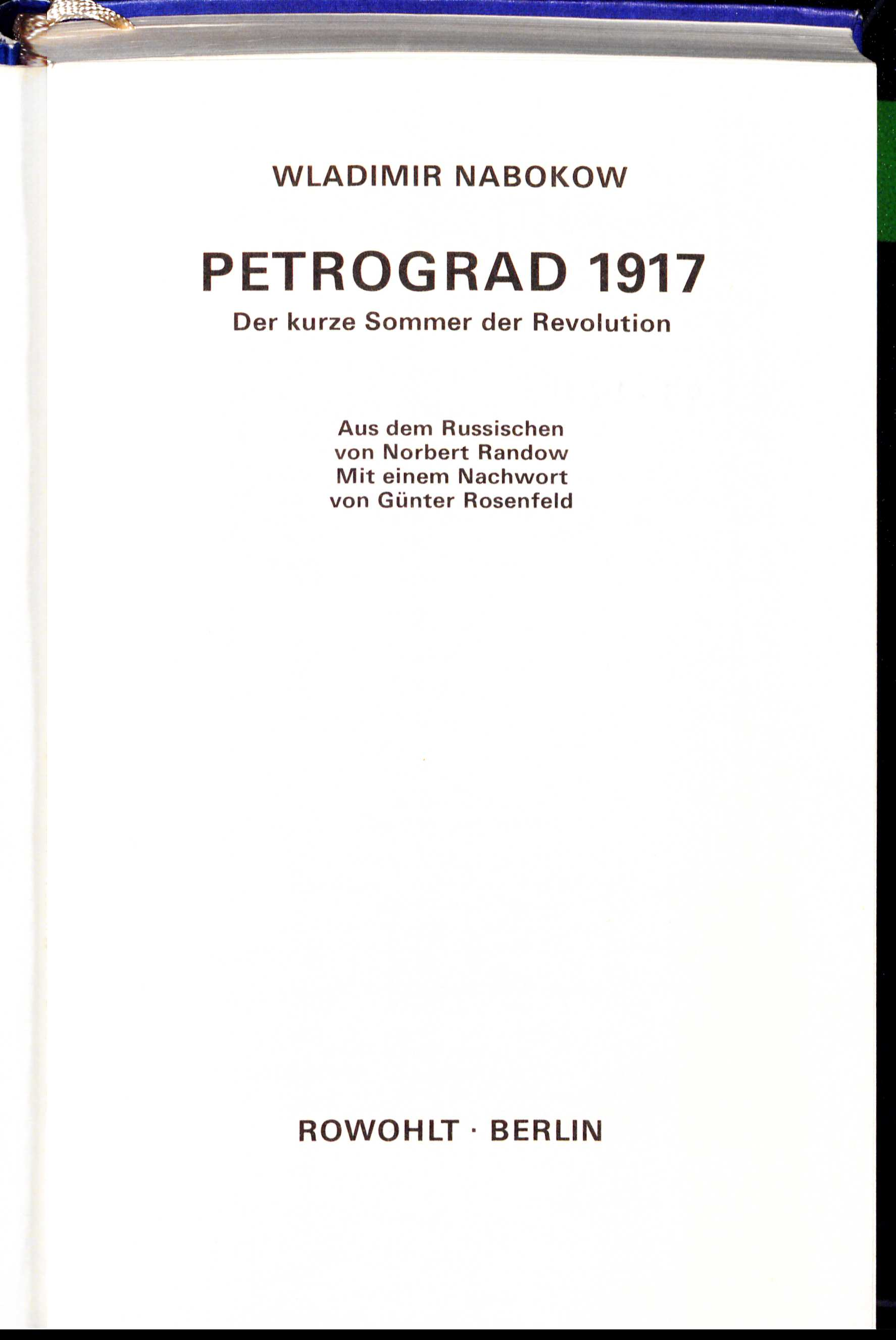 Wladimir Nabokow Petrograd 1992 Titel